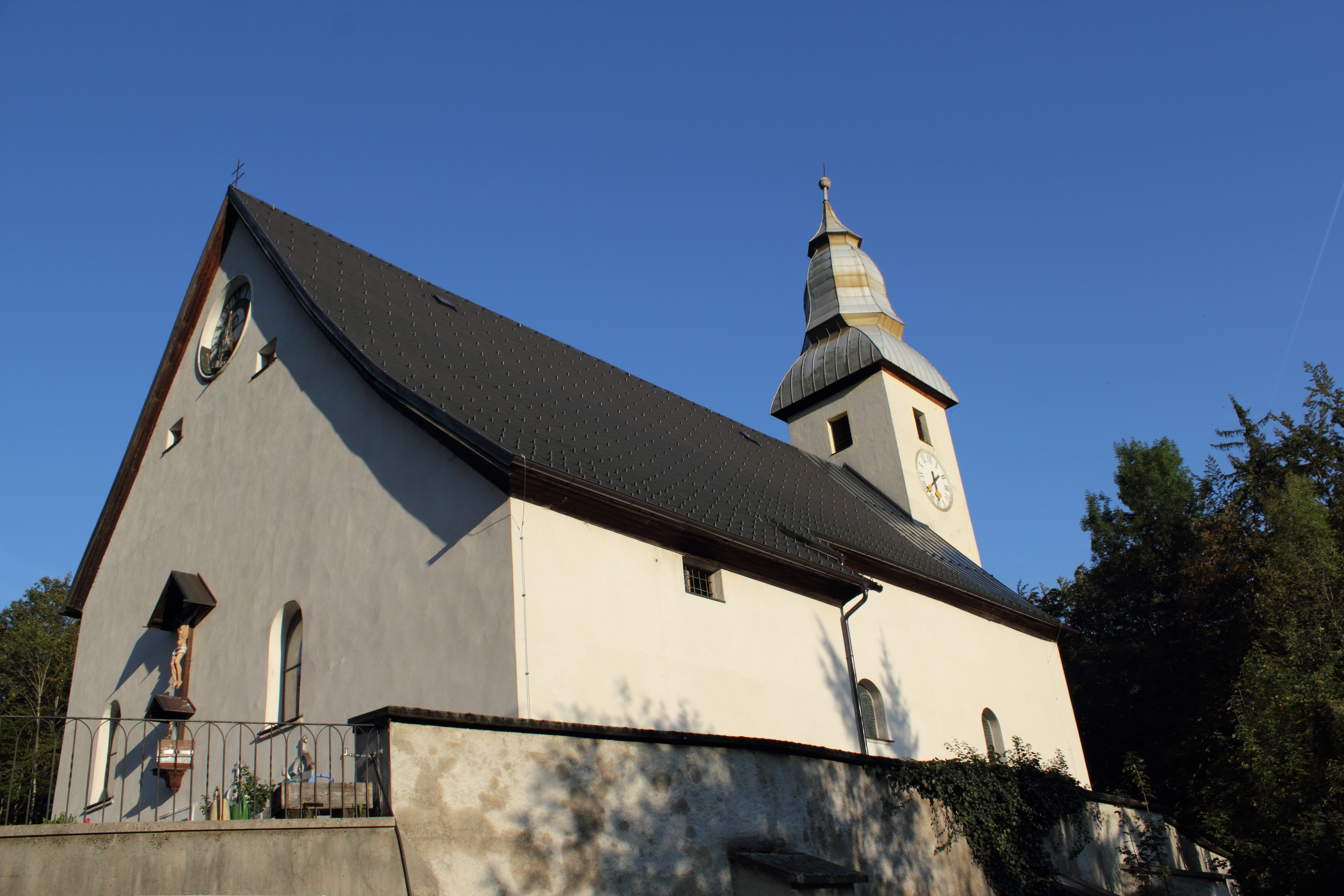 Kath. Pfarrkirche Allerheiligen mit Friedhof